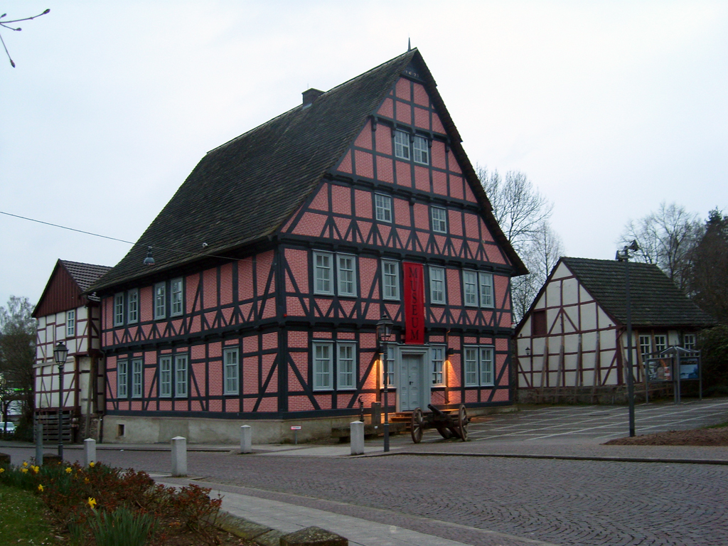 Heimatmuseum in Uslar.